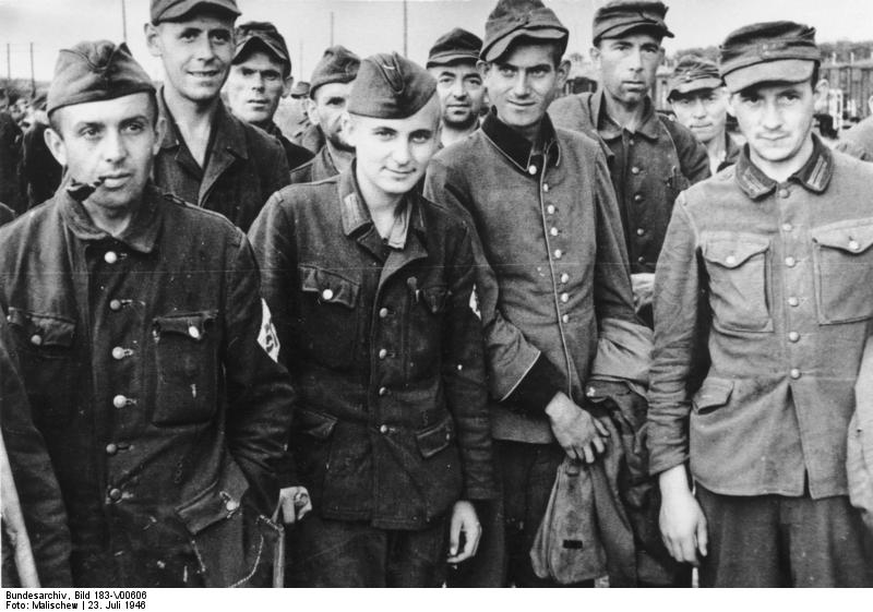 Zur Ankunft der ersten deutschen Kriegsgefangenen aus der Sowjet-Union. Auf dem Bild: Eine Gruppe von Kriegsgefangenen welche in Frankfurt an der Oder eingetroffen sind.